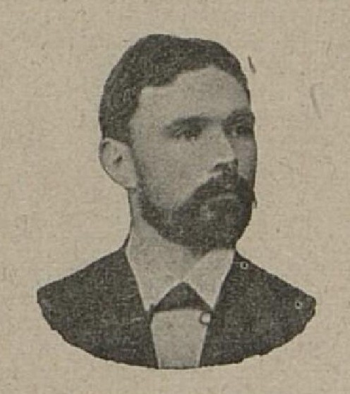 Jan Vladimír Pokorný (1860-1922), rakouský a český politik